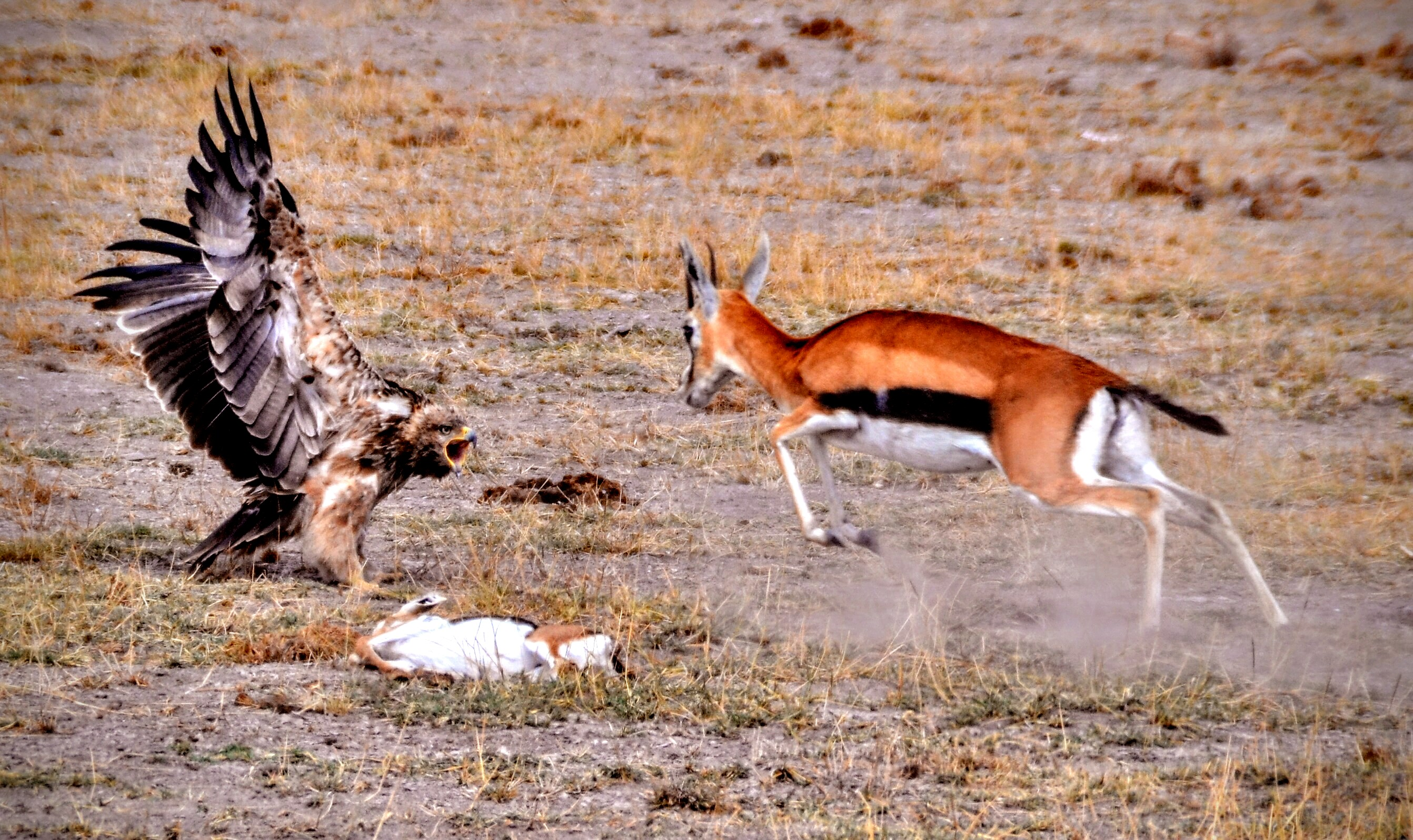 Safari por Kenia